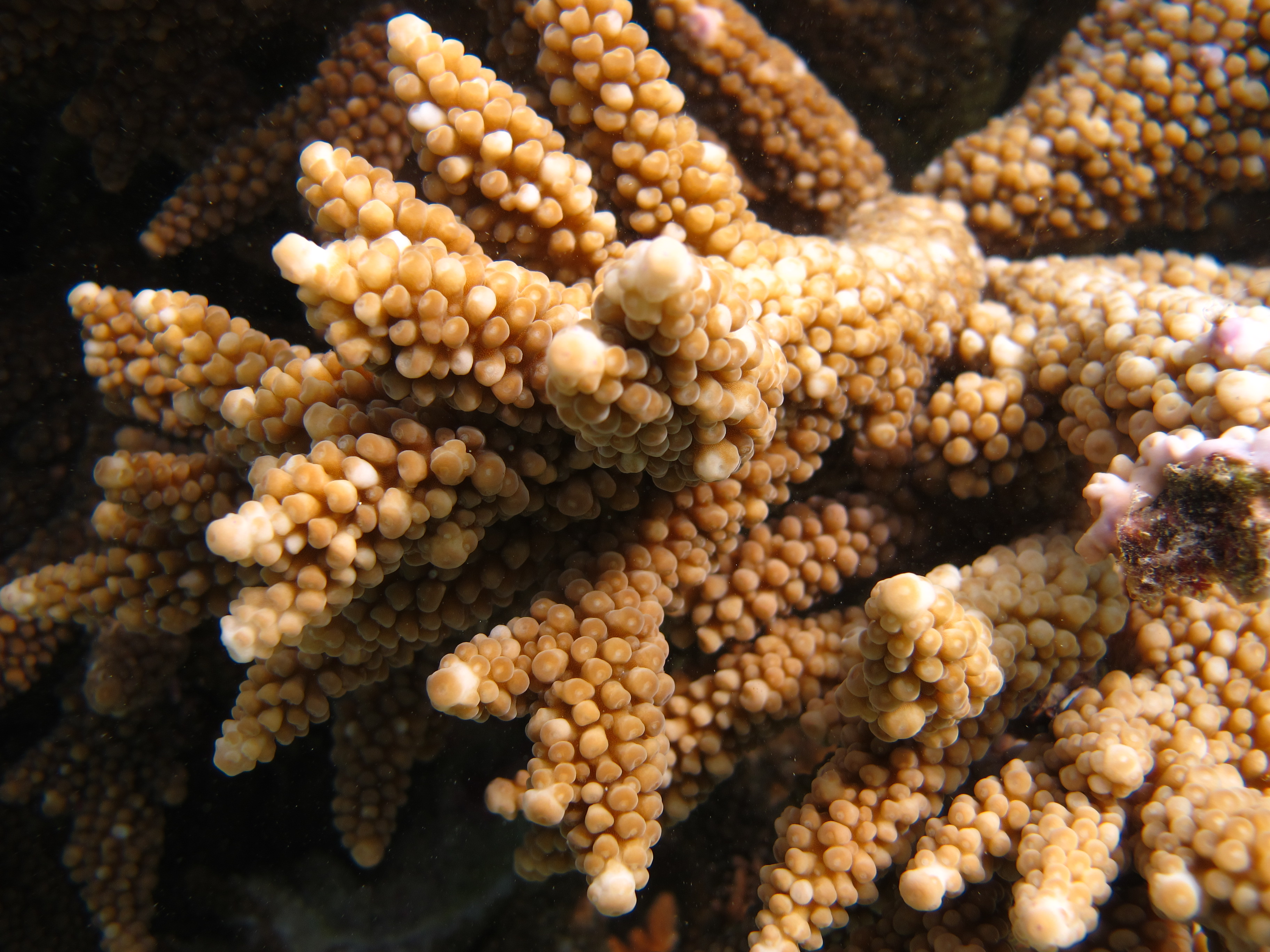 Gros plan sur du corail Acropora austera aux Maldives (atoll de Baa).